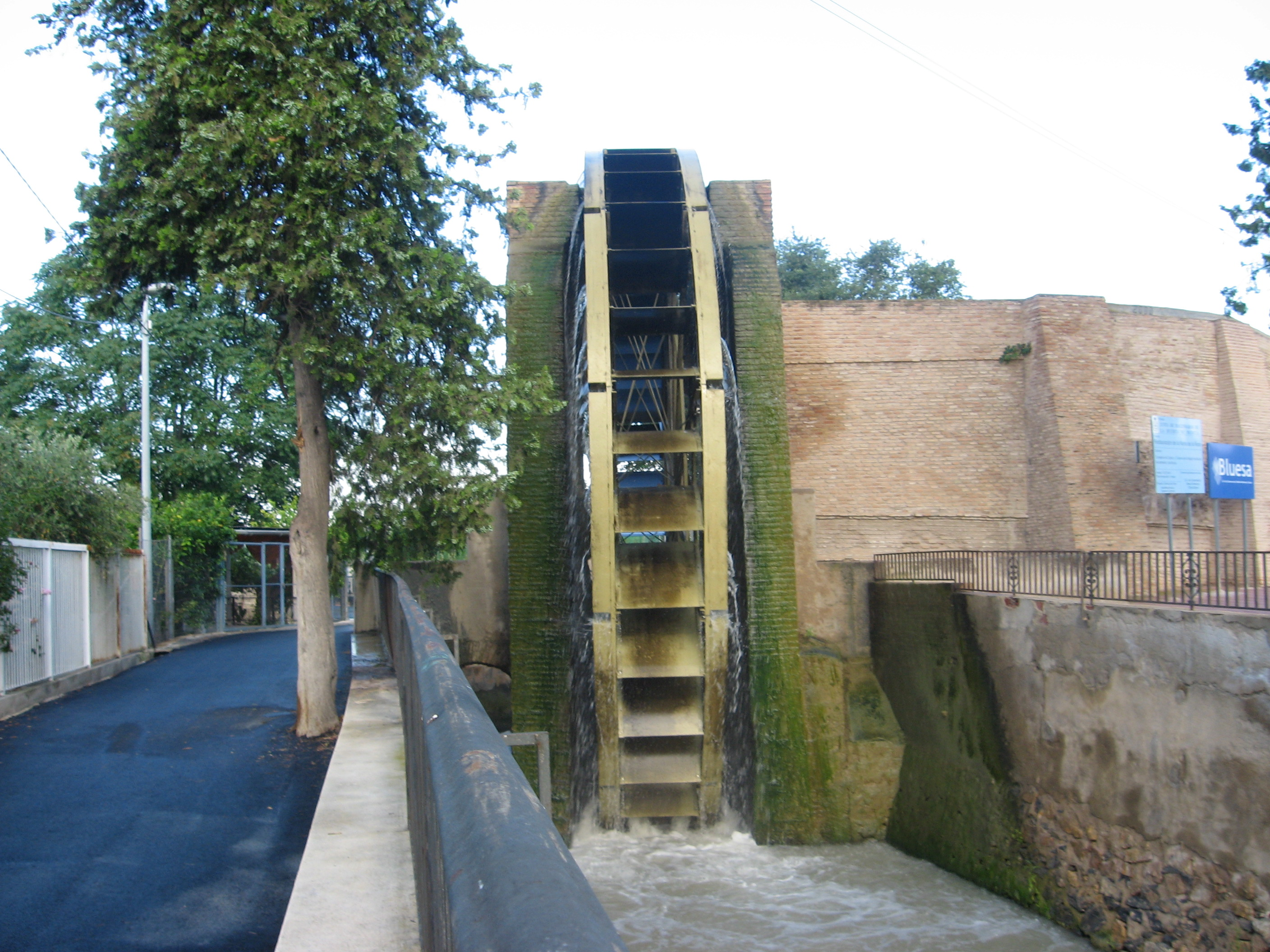 Noria de origen árabe situada en la pedanía de la huerta murciana de La Ñora, aún en funcionamiento.